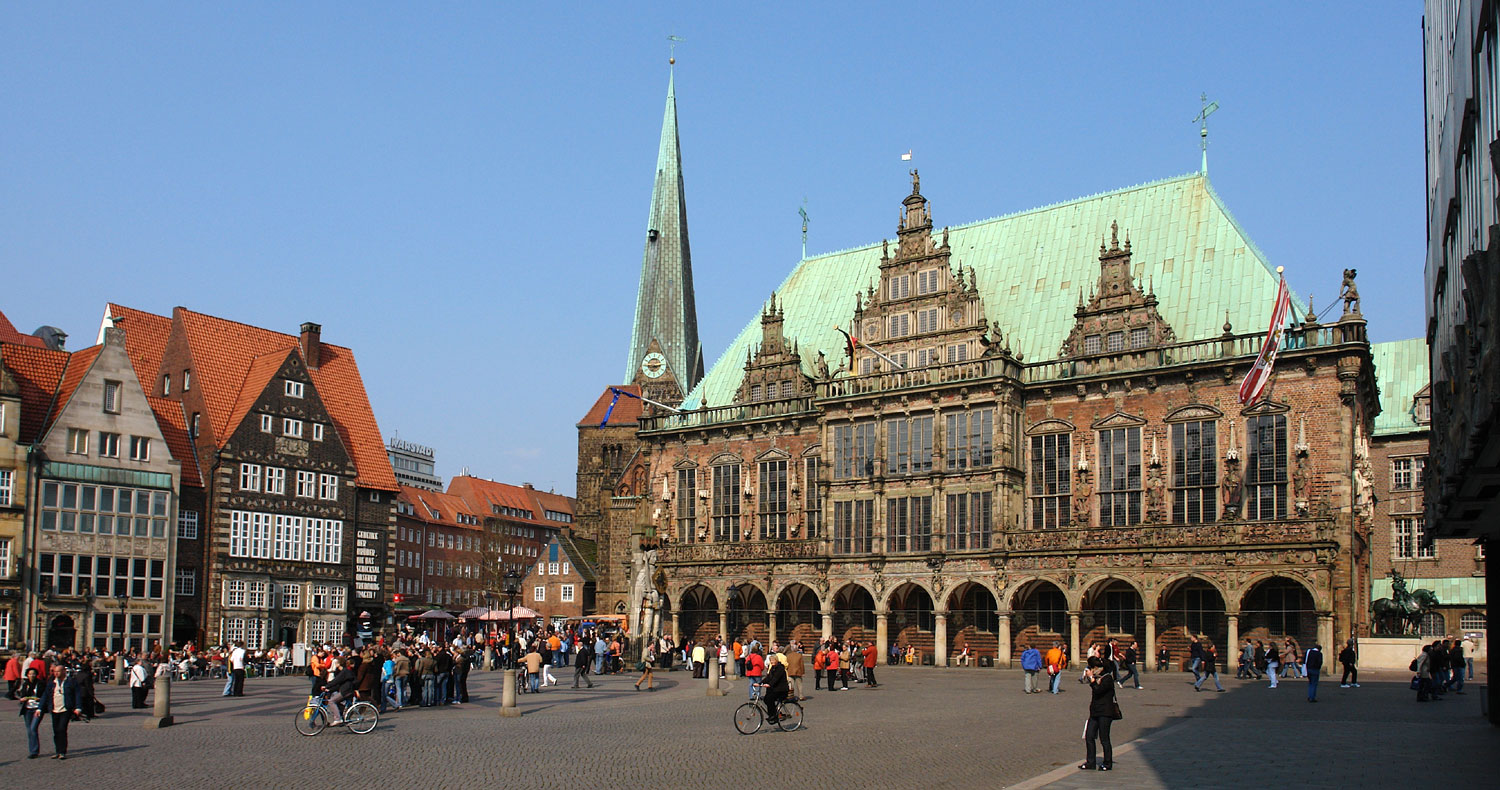 Rathaus in Bremen mit Kirchturm Unser Lieben Frauen Das Bremer Rathaus ist ein geschütztes Kulturdenkmal in der Freien Hansestadt Bremen, mit der Nr. 0066,T001 beim Landesamt für Denkmalpflege registriert.